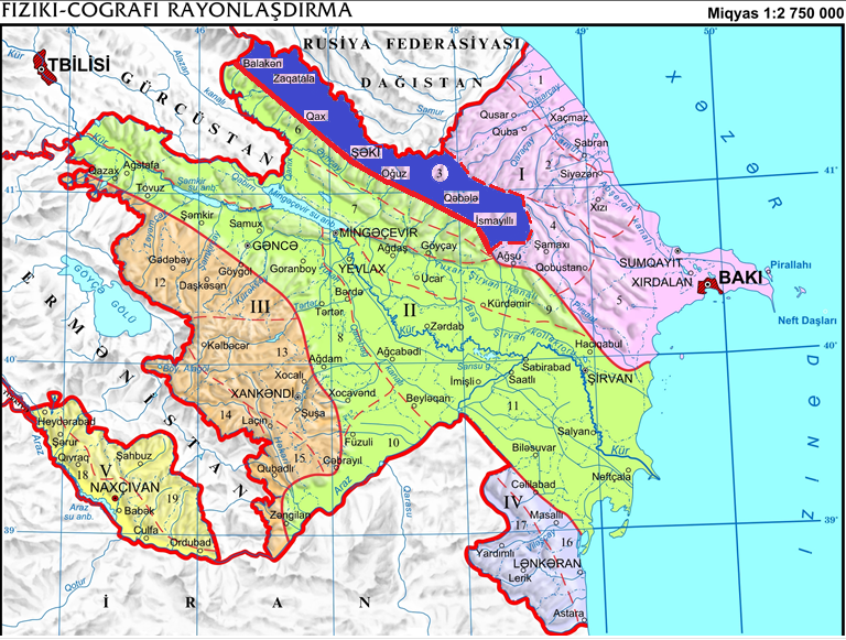 Zaqatala-Lahic fiziki-coğrafi rayonu